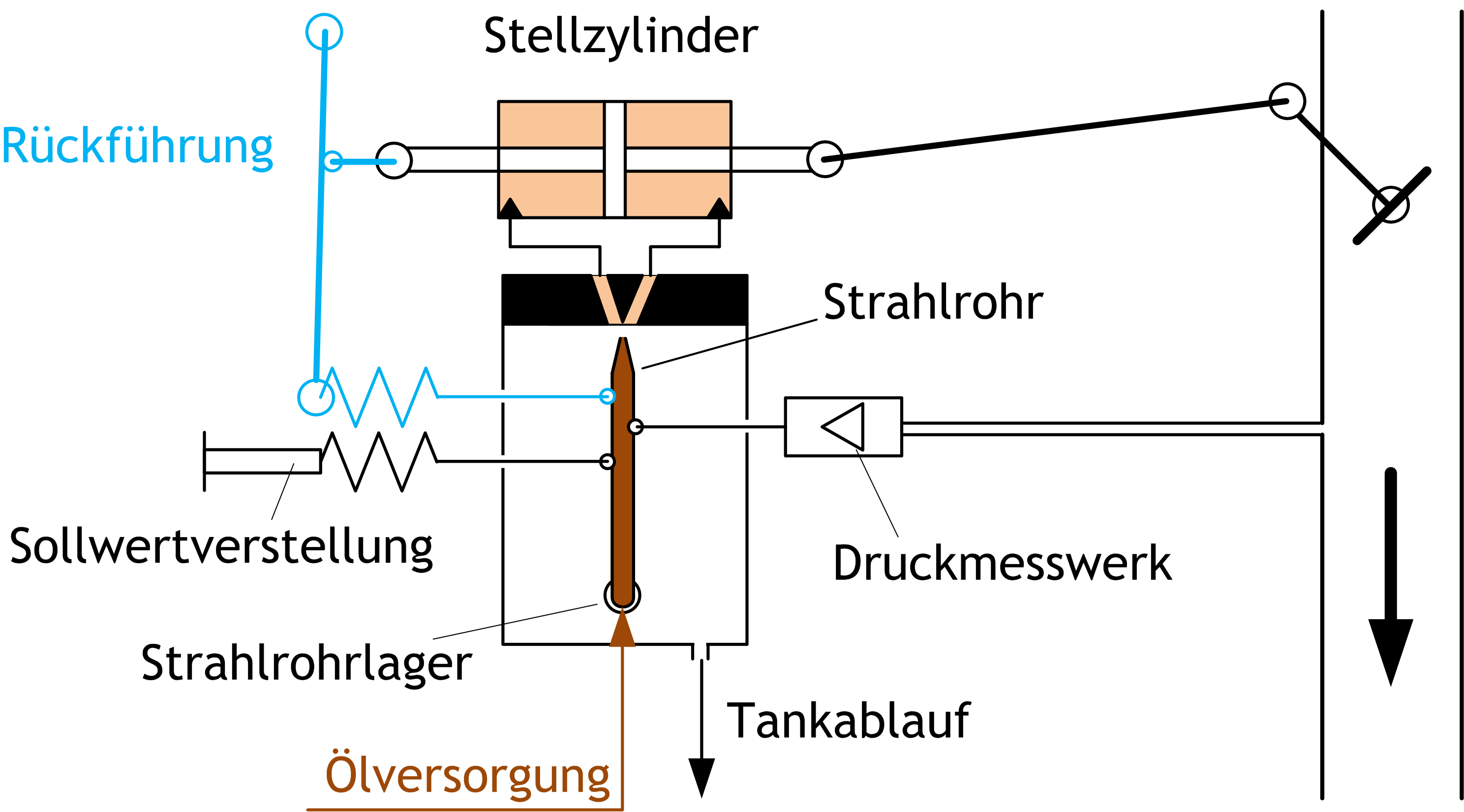 Prinzipbild eines hydraulischen Strahlrohrreglers, einschließlich einer Rückführung (blau), die den reinen Integralregler zum PT1-Regler modifiziert. Das Strahlrohr (Braun) wird durch die Sollwertverstellung, das Druckmesswerk und die gegebenenfalls vorhandene Rückführung ausgelenkt und beaufschlagt die entsprechende Seite des Stellzylinders.